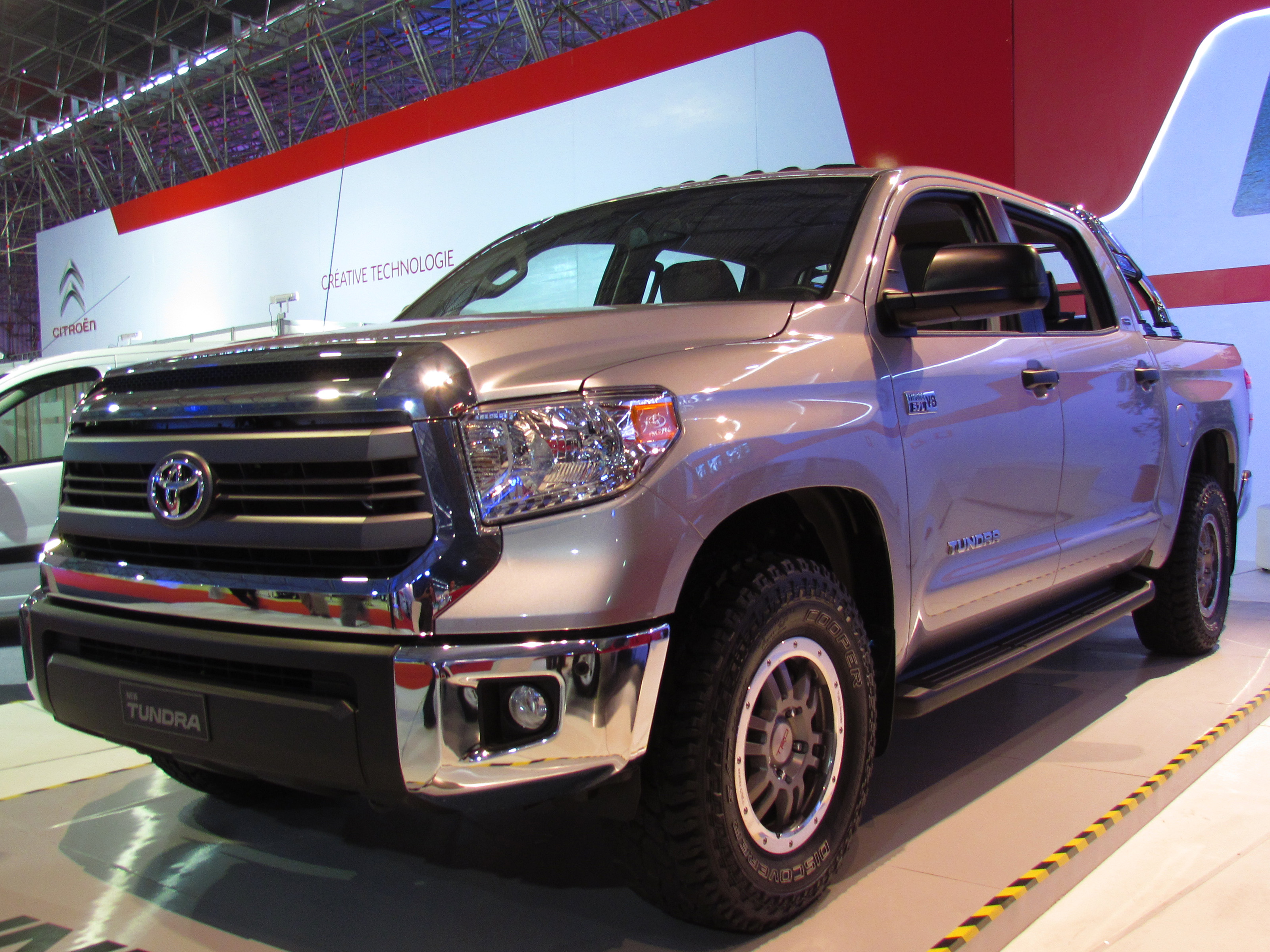 Toyota Tundra SR5 V8 TRD 2014